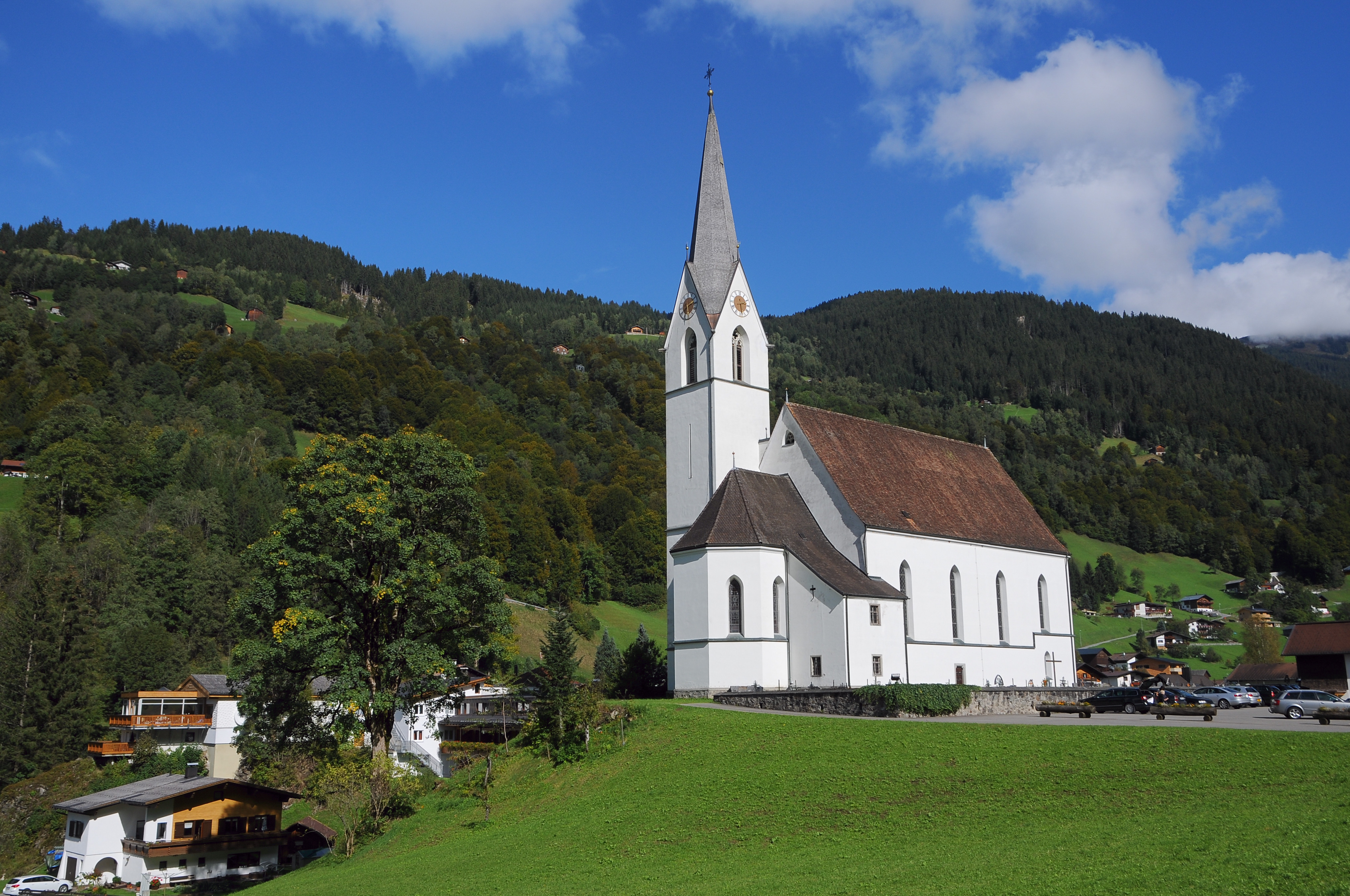 Kath. Pfarrkirche hll. Josef und Nikolaus.